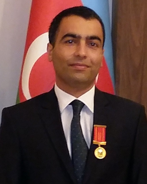 Mahir Qəniyev